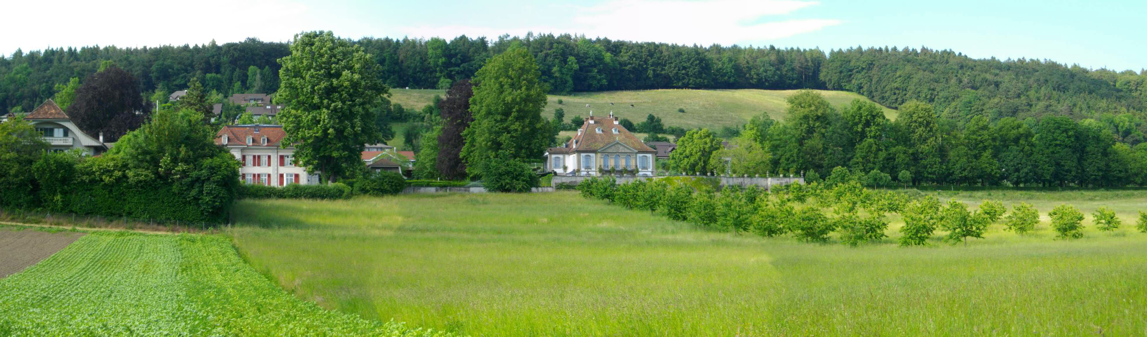 Panorama en Gümligen